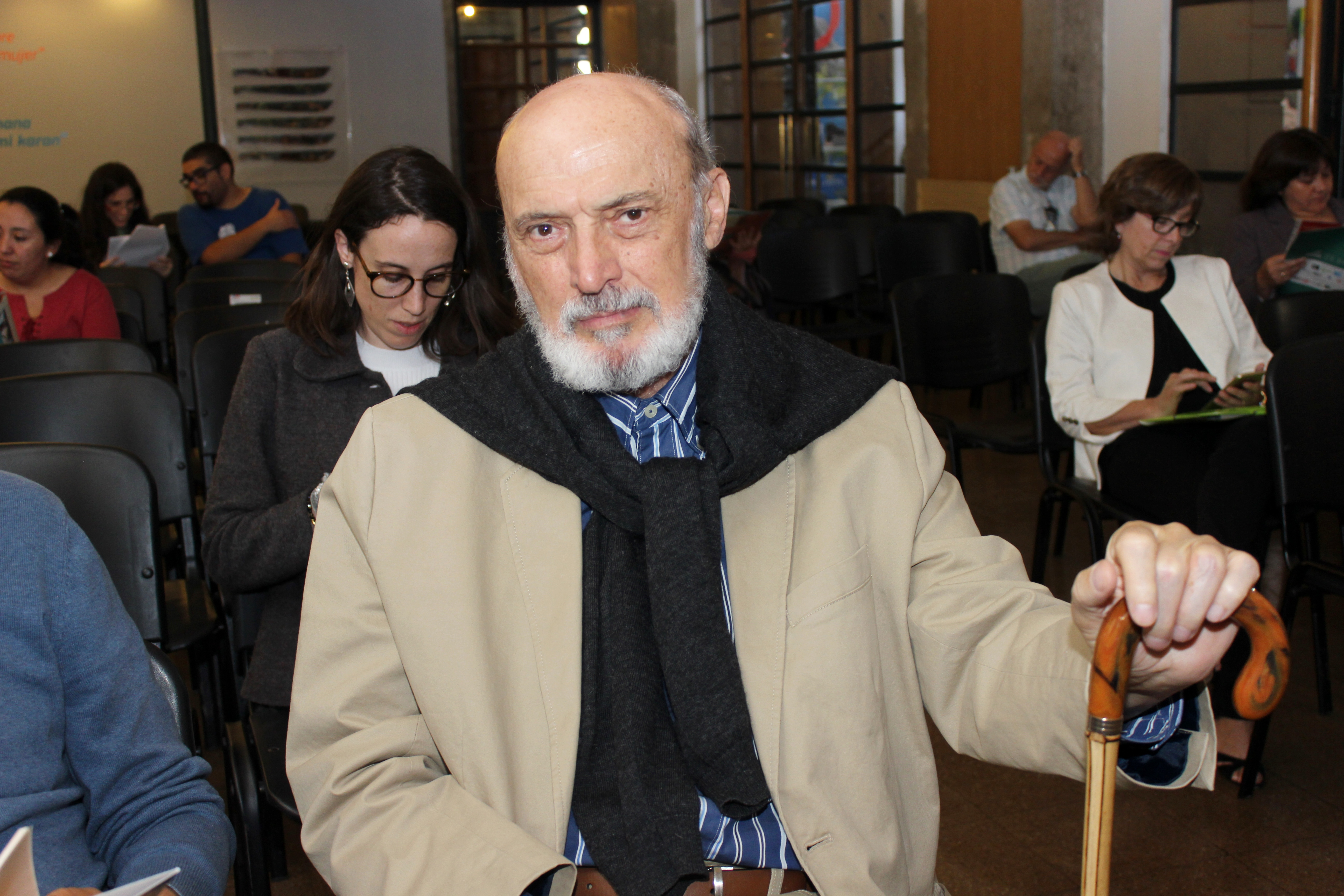 El escritor peruano Fernando Ampuero en la Feria Internacional del Libro de Santiago 2018.